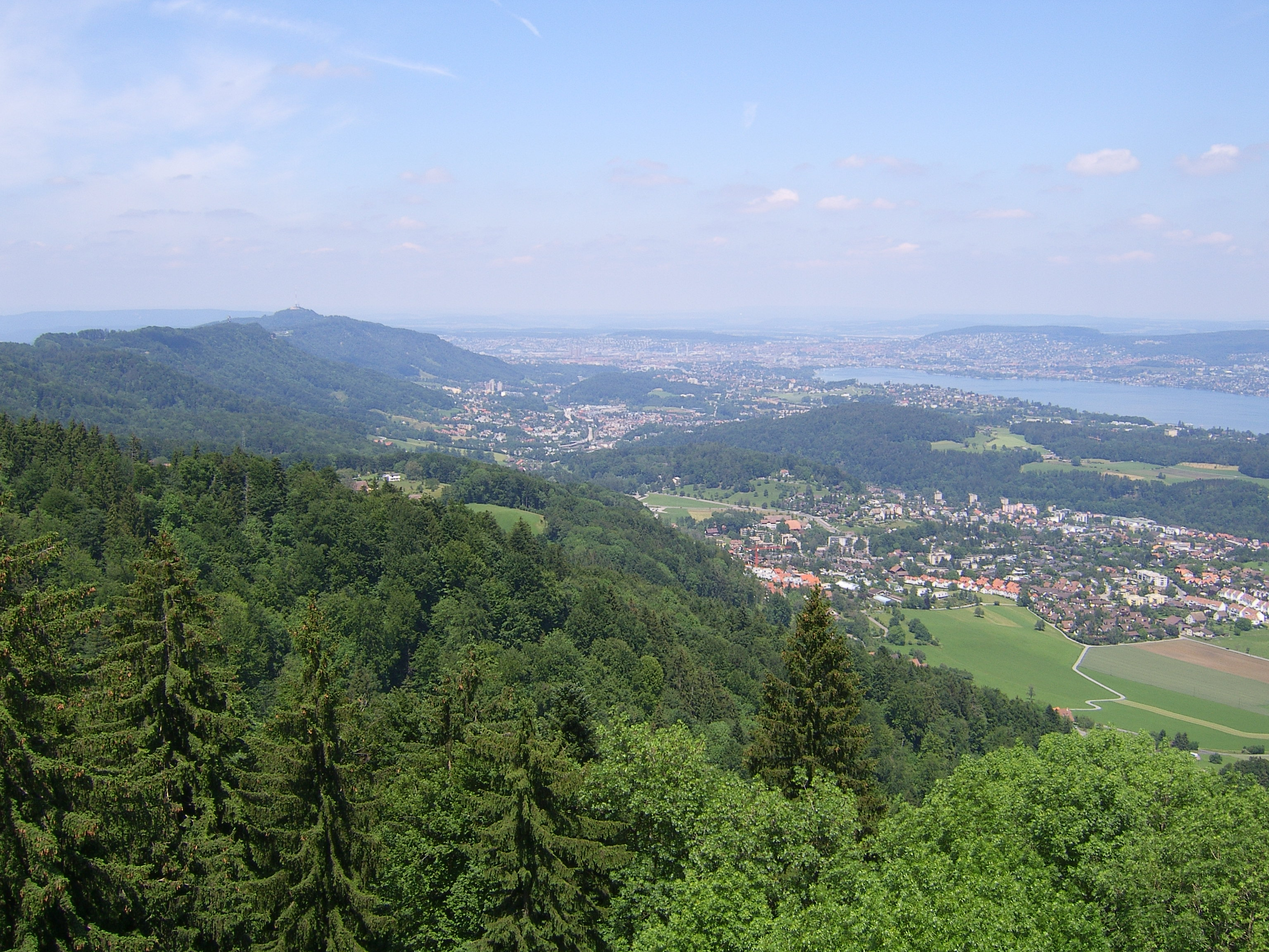 Blick vom Aussichtsturm Hochwacht über Albiskette, Langnau am Albis, Adliswil und Zürichsee nach Zürich